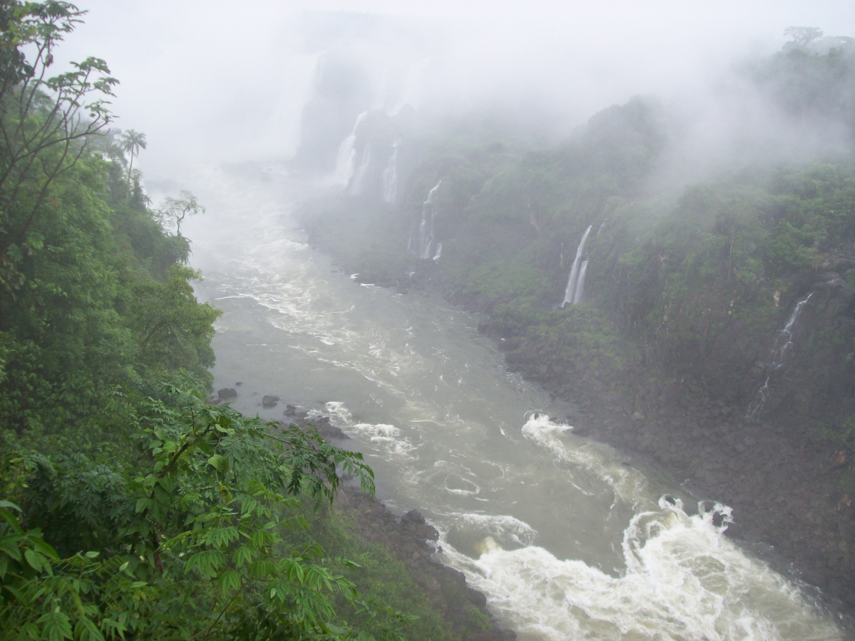 Río Iguazú visto desde el sendero brasileño